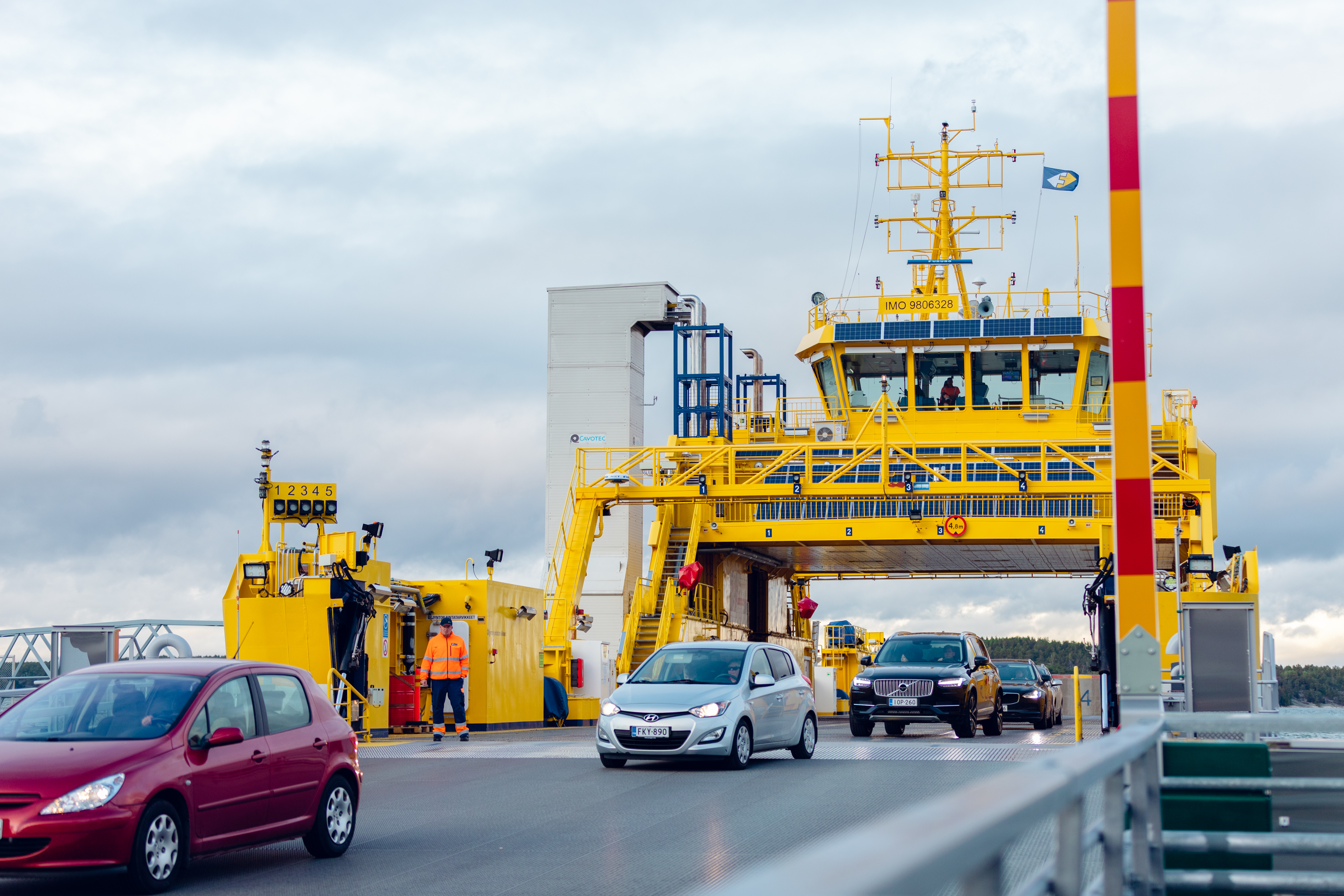 Nagu Pargas Prostvik färjfäste Elektra